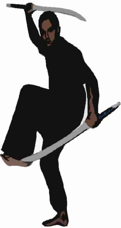 double dha.jpg